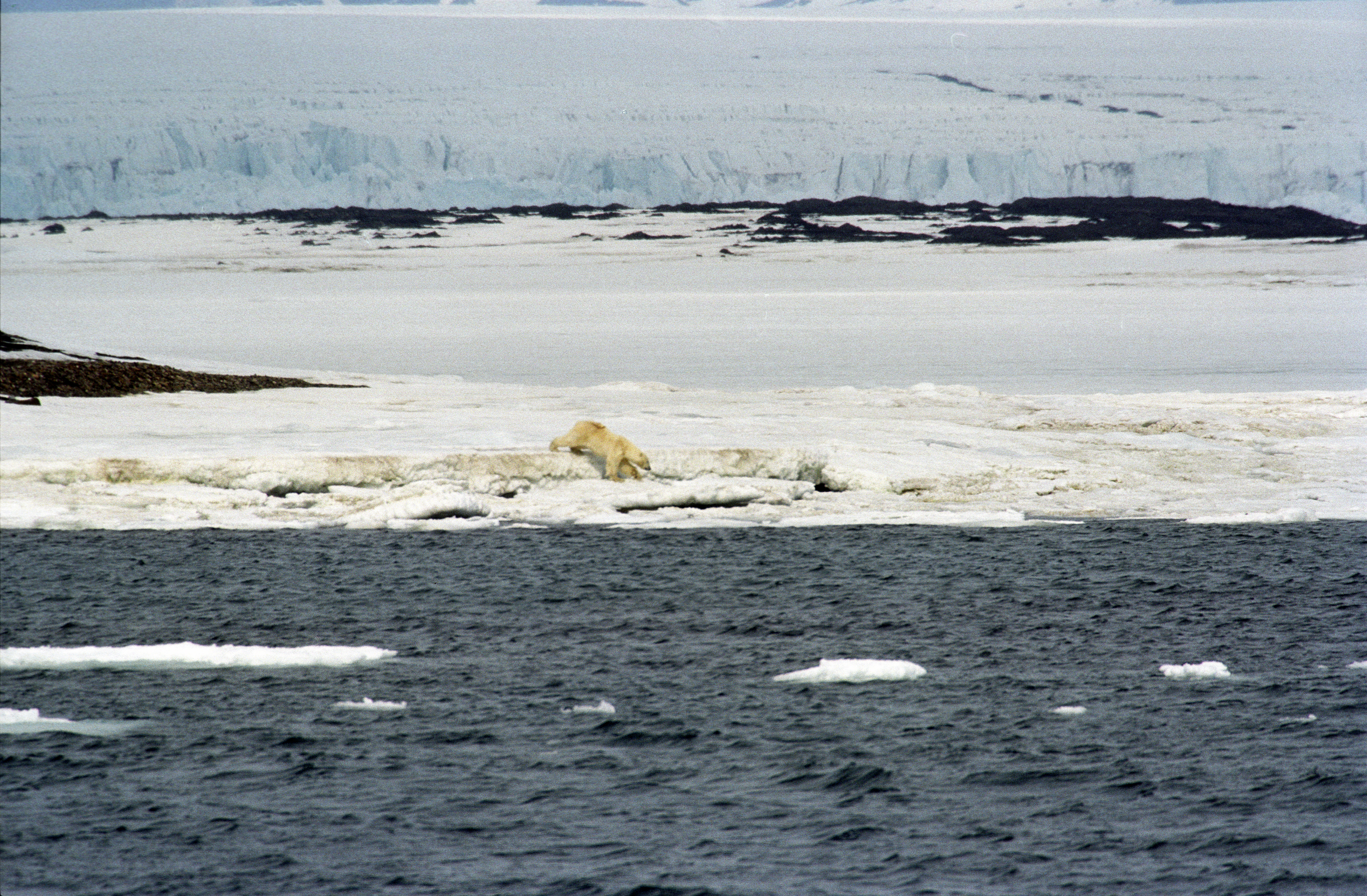 Svalbard, Hornsund